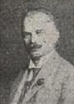 Jan Slavíček (1875-1959), československý politik